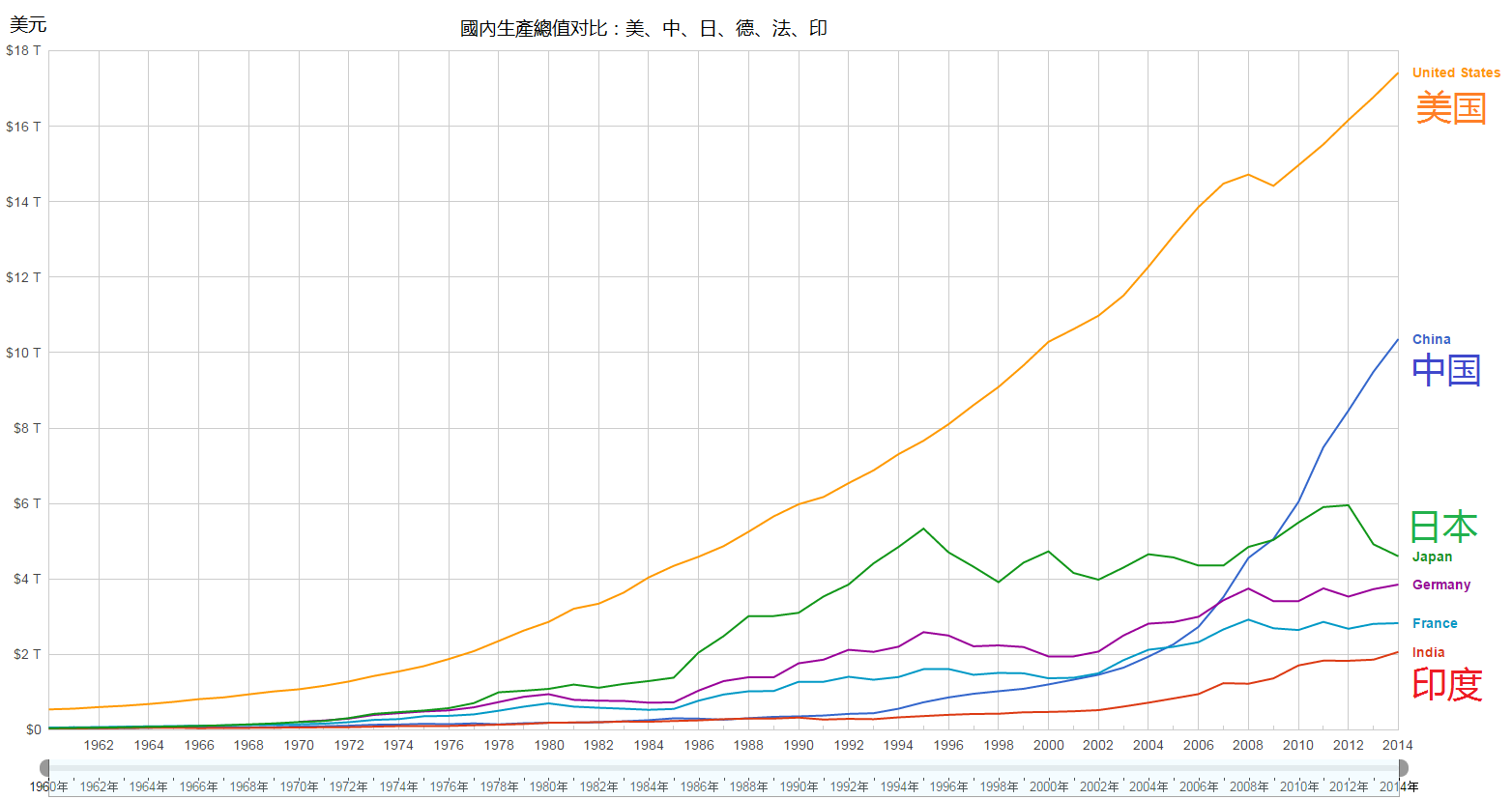 中国的GDP与其他几个国家的比较，比较的国家有：德国、法国、意大利、英国